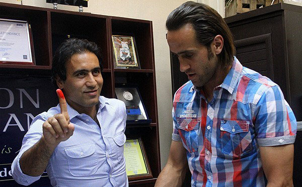 ثبت قرارداد کریمی و مهدوی کیا با باشگاه پرسپولیس در هیات فوتبال- فصل ۹۲-۱۳۹۱ - تیرماه ۱۳۹۱